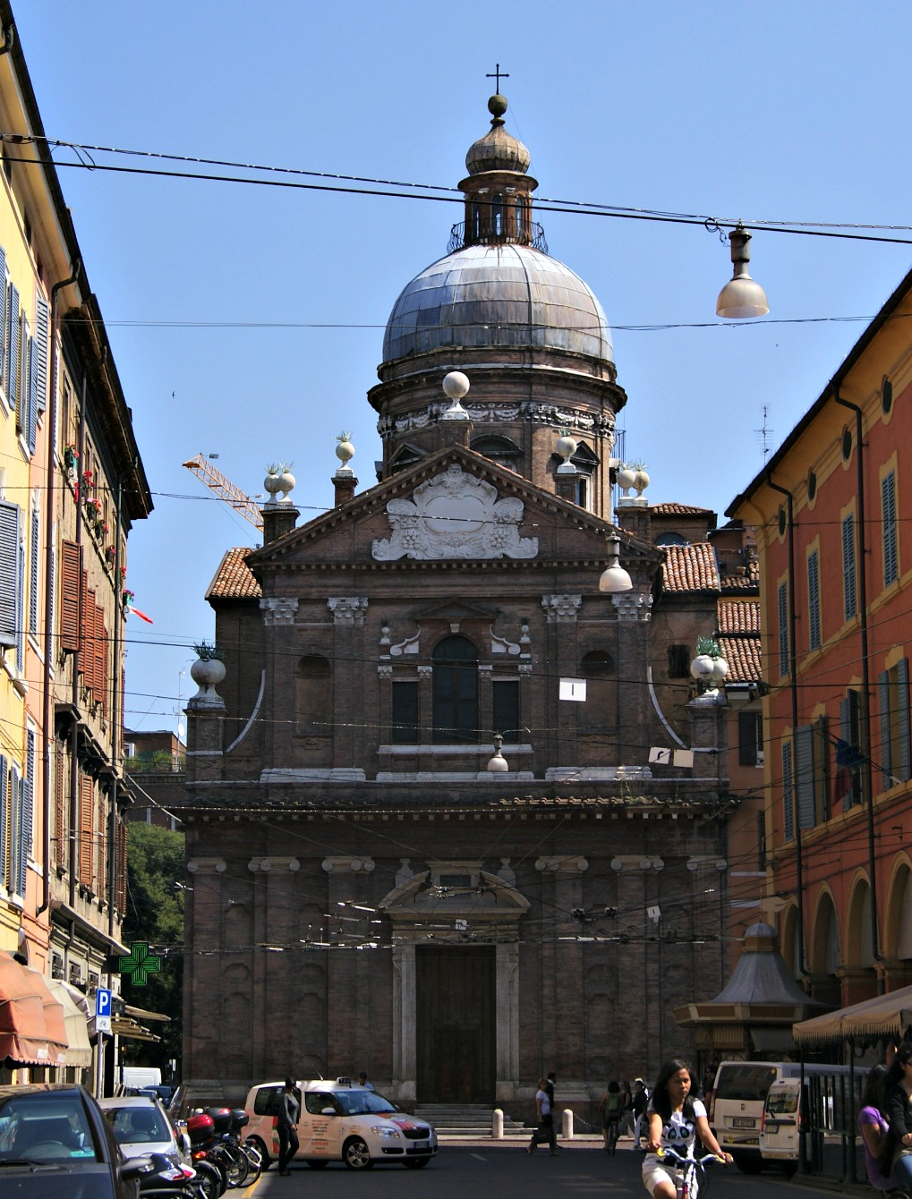 Chiesa del Voto This is a photo of a monument which is part of cultural heritage of Italy.